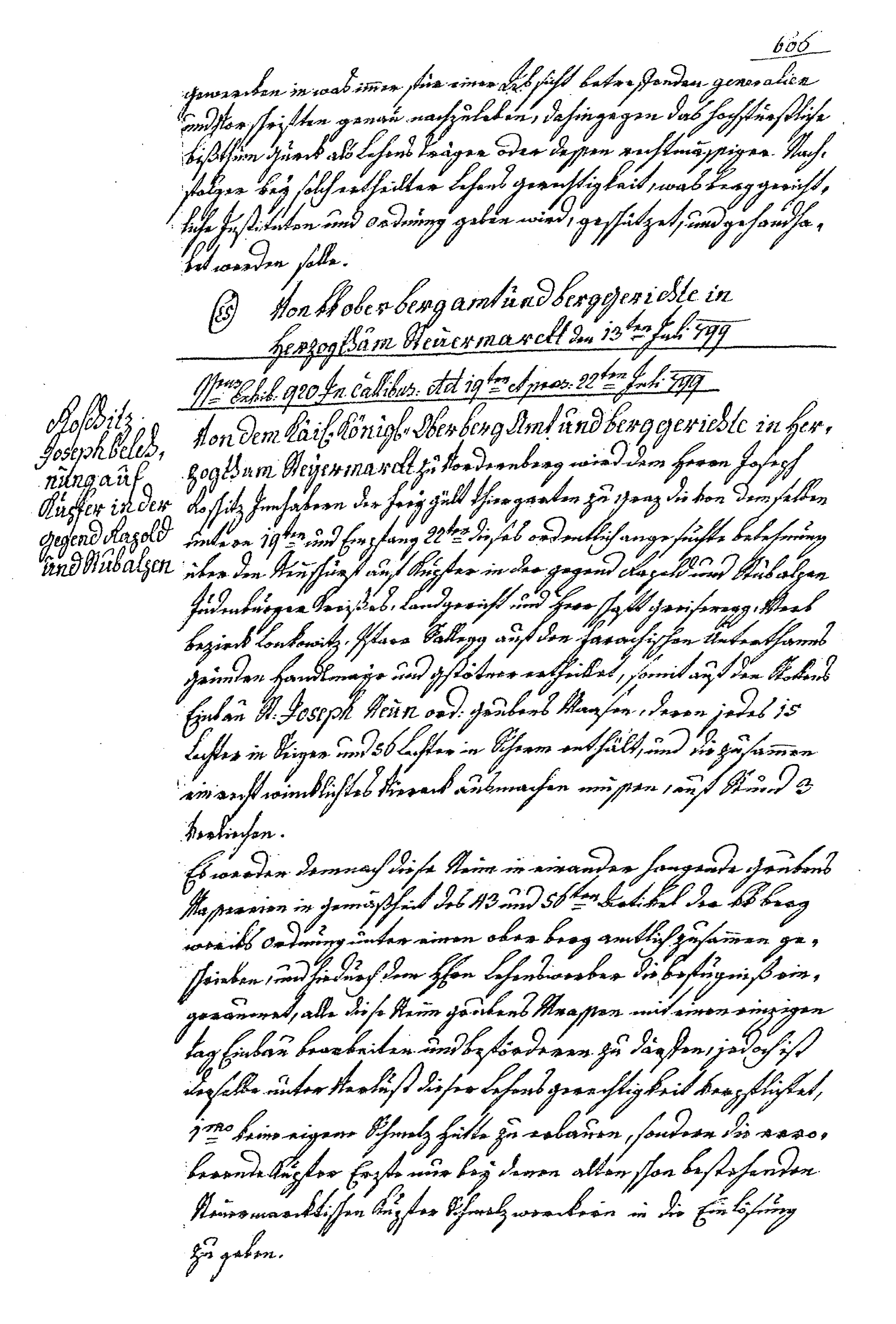 Schurfbucheintrag mit der rechtlichen Erlaubnis für Joseph Roschitz, in der Gegend "Rapold und Stubalpen", auf Kupfer zu schürfen